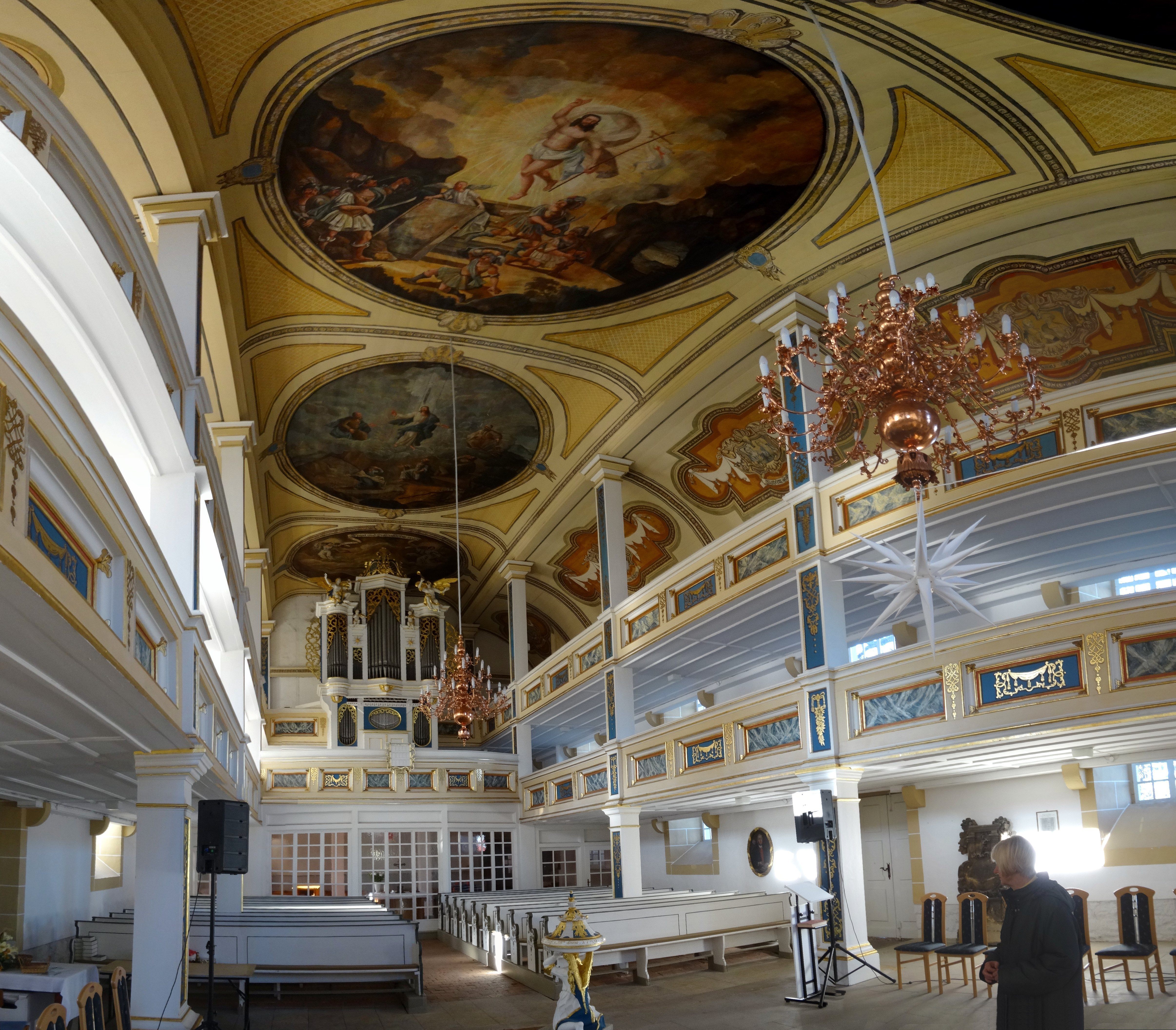 Innenraum-Panorama Gräfenhain St.Trinitatis